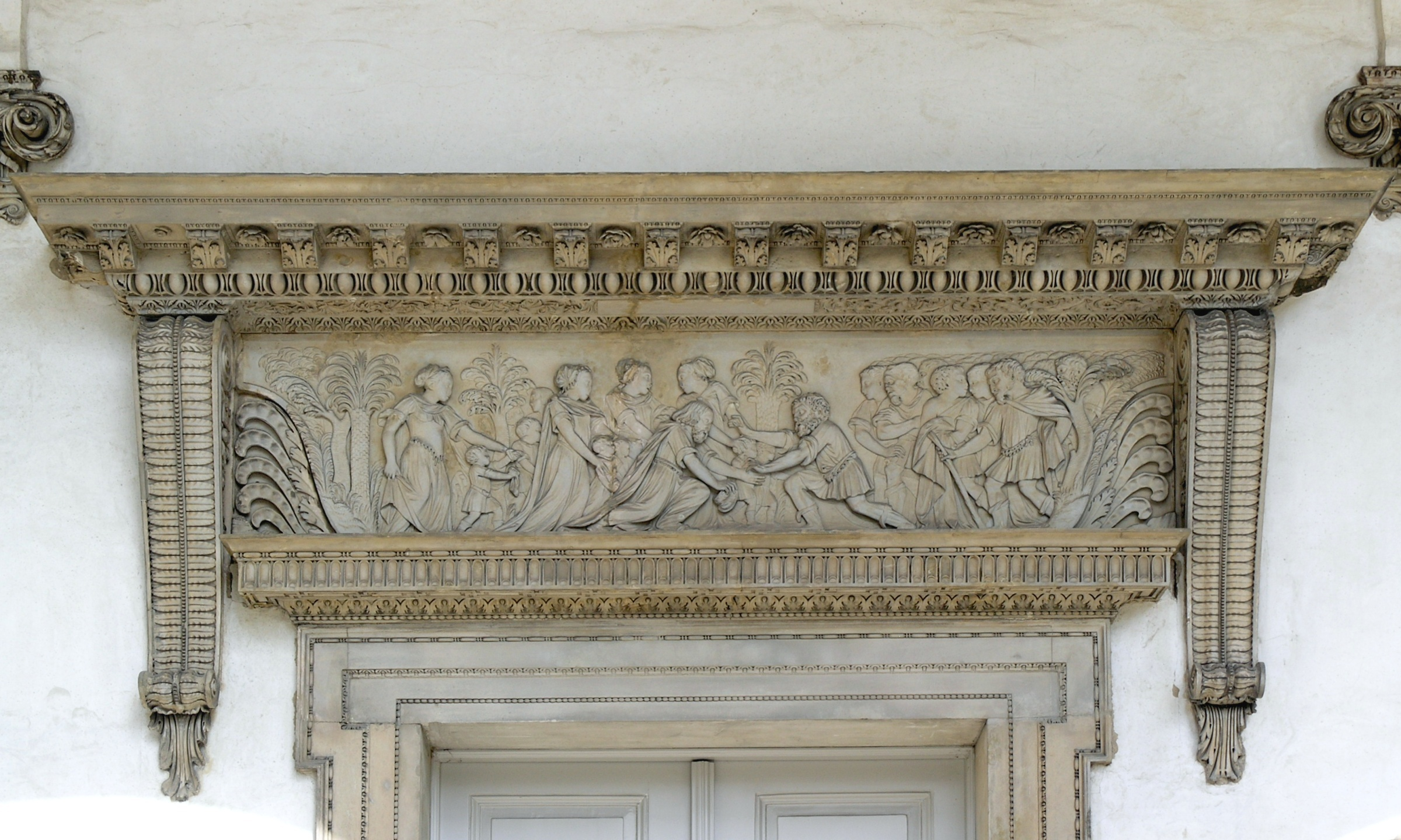 Praha, Hradčany - Letohrádek královny Anny, výzdoba nad dveřmi